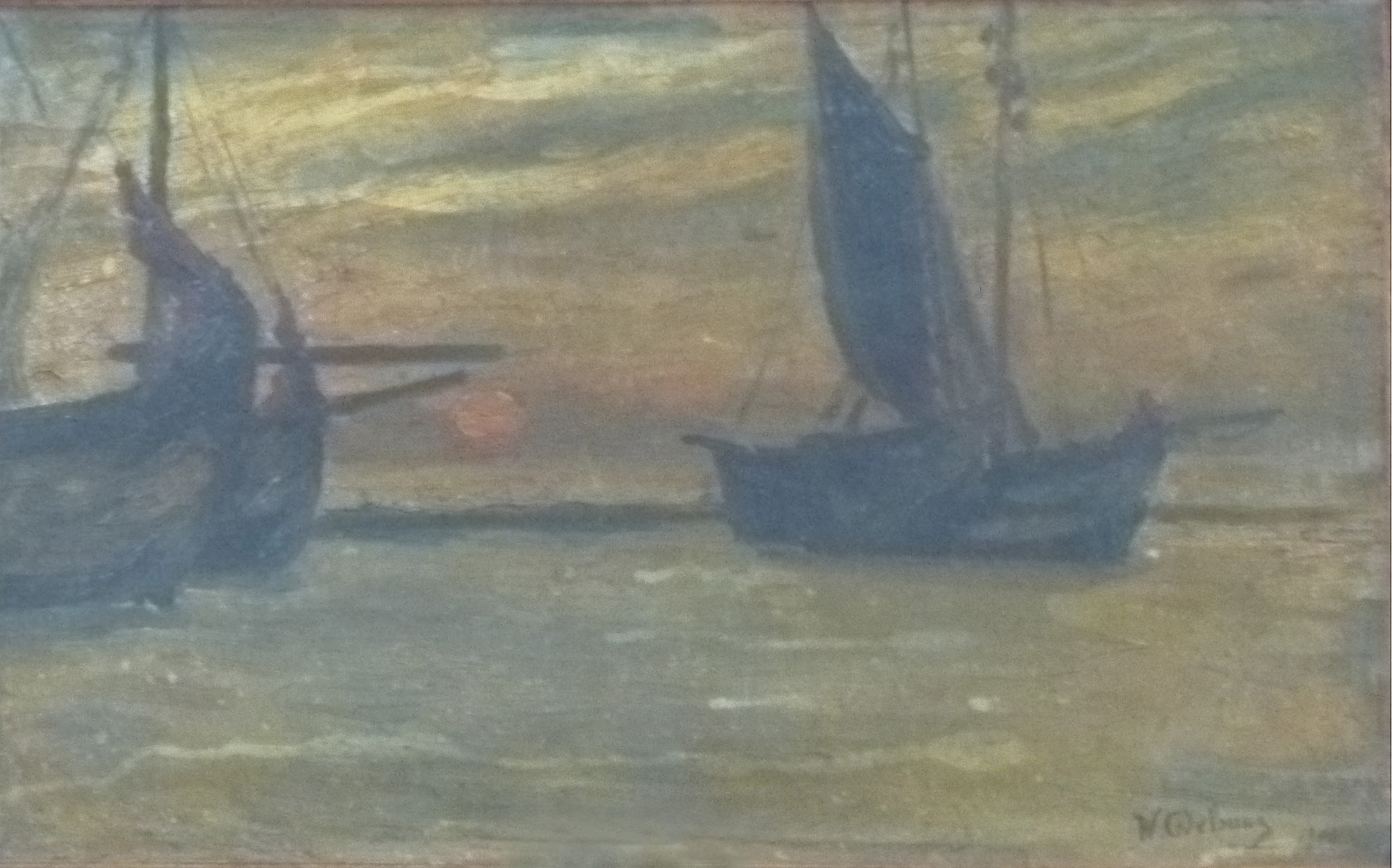 "Marine", olieverf op doek (30 x 50 cm) door de Belgische kunstschilder Willem Delsaux (1862-1945); privébezit